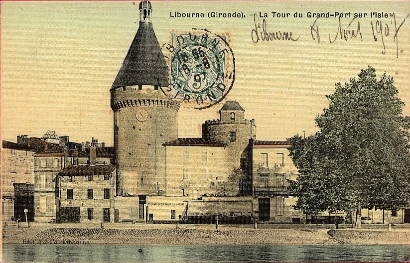 La Tour du Grand Port - Libourne